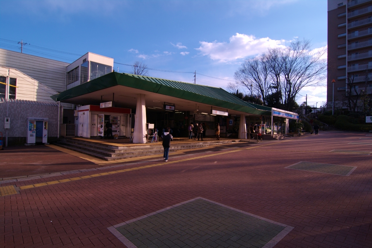 東京急行電鉄田園都市線 すずかけ台駅 駅舎